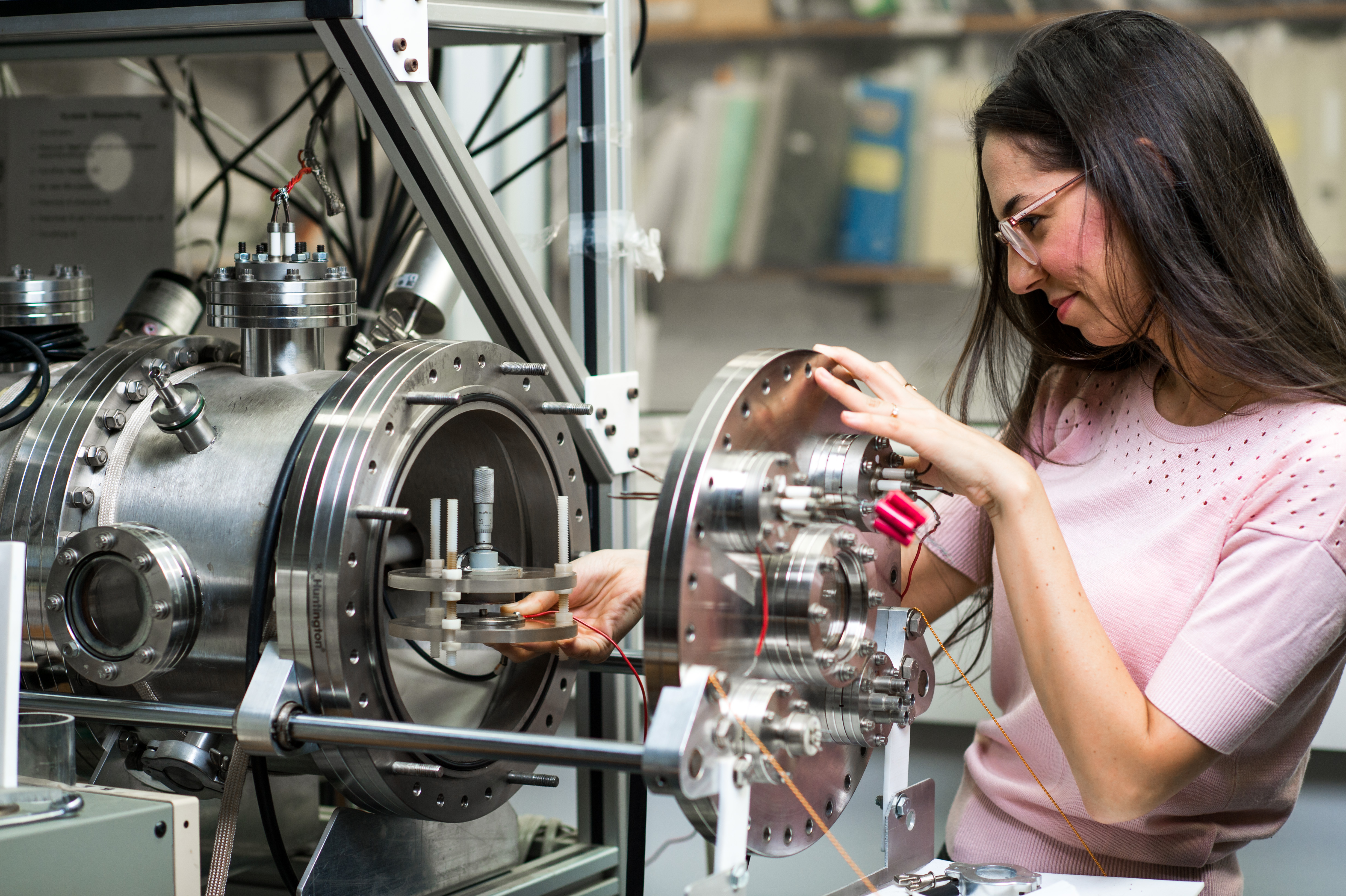 סטודנטים וסטודנטיות בהנחיית חברי סגל (העוסקים במחקר) מובילים פרוייקטים ומחקרים פורצי דרך